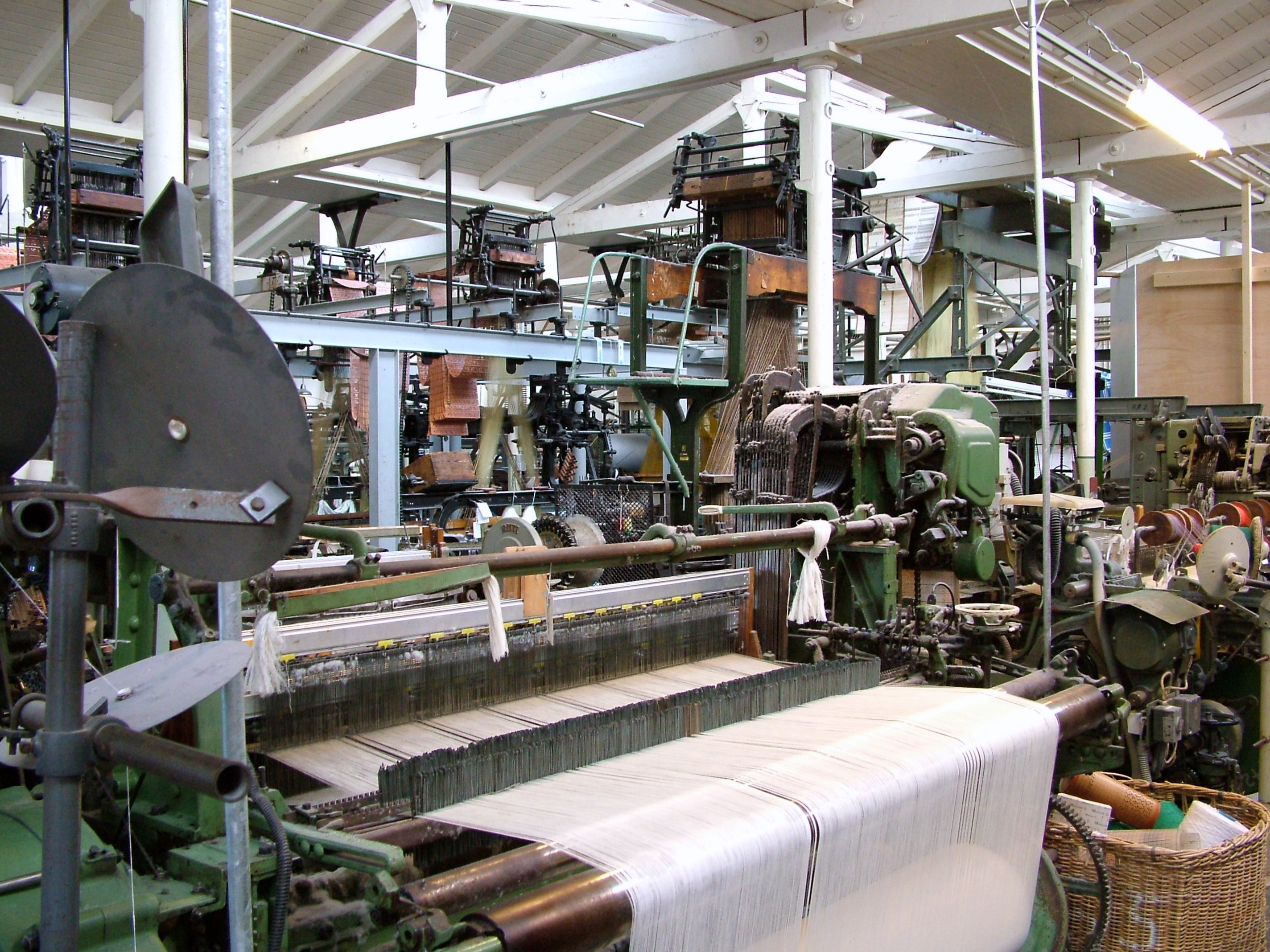 Textilmuseum Bocholt, mechanisierter Webstuhl